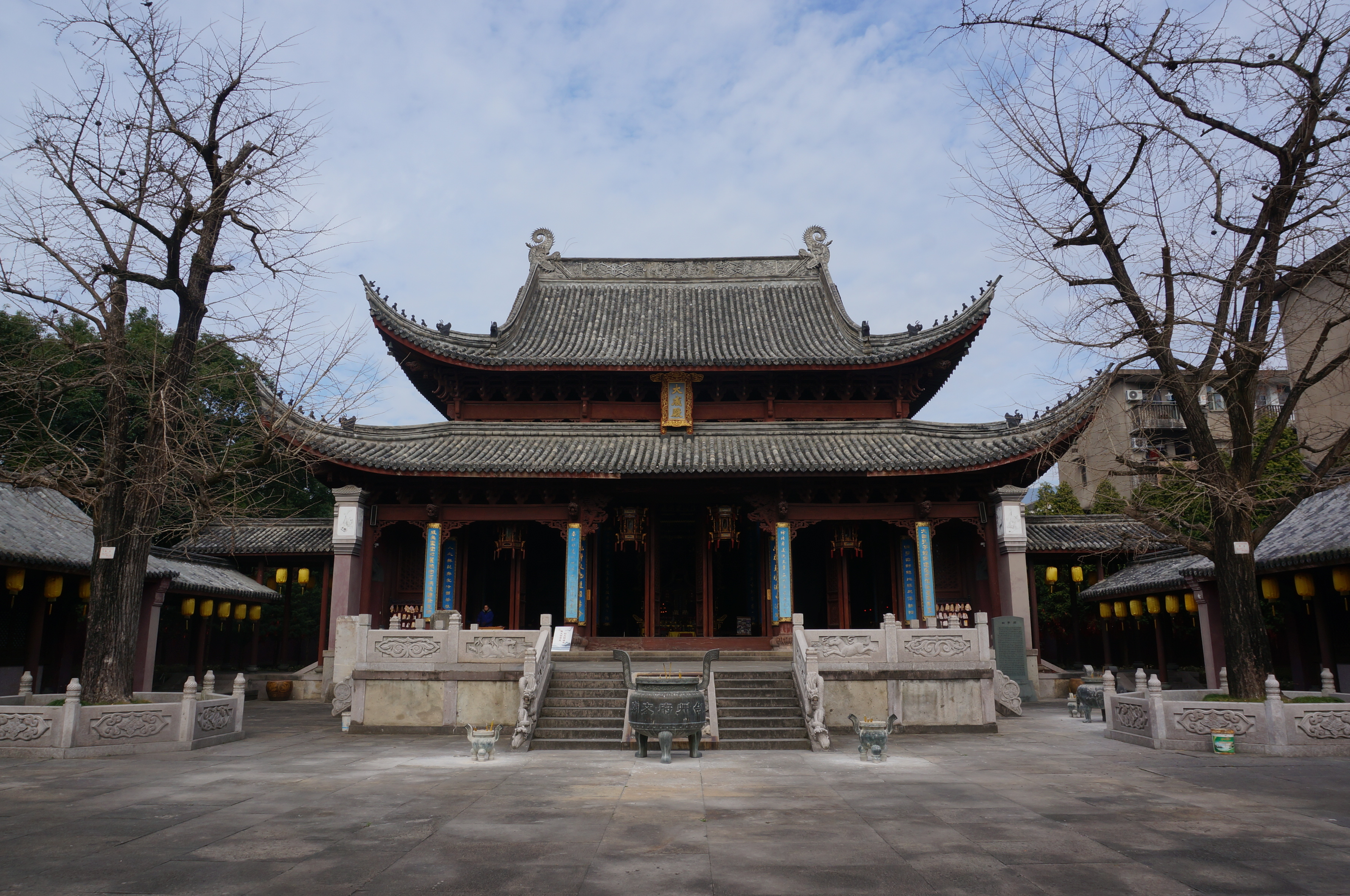 台州府文庙，大成殿，南面。